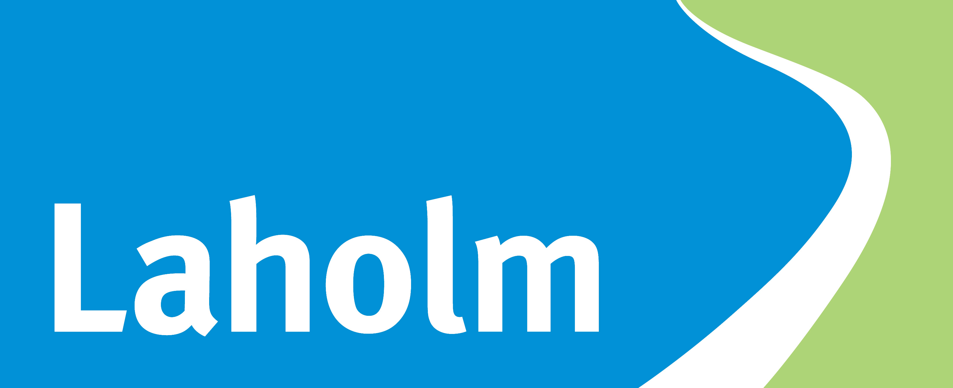 Laholms kommuns logotyp.